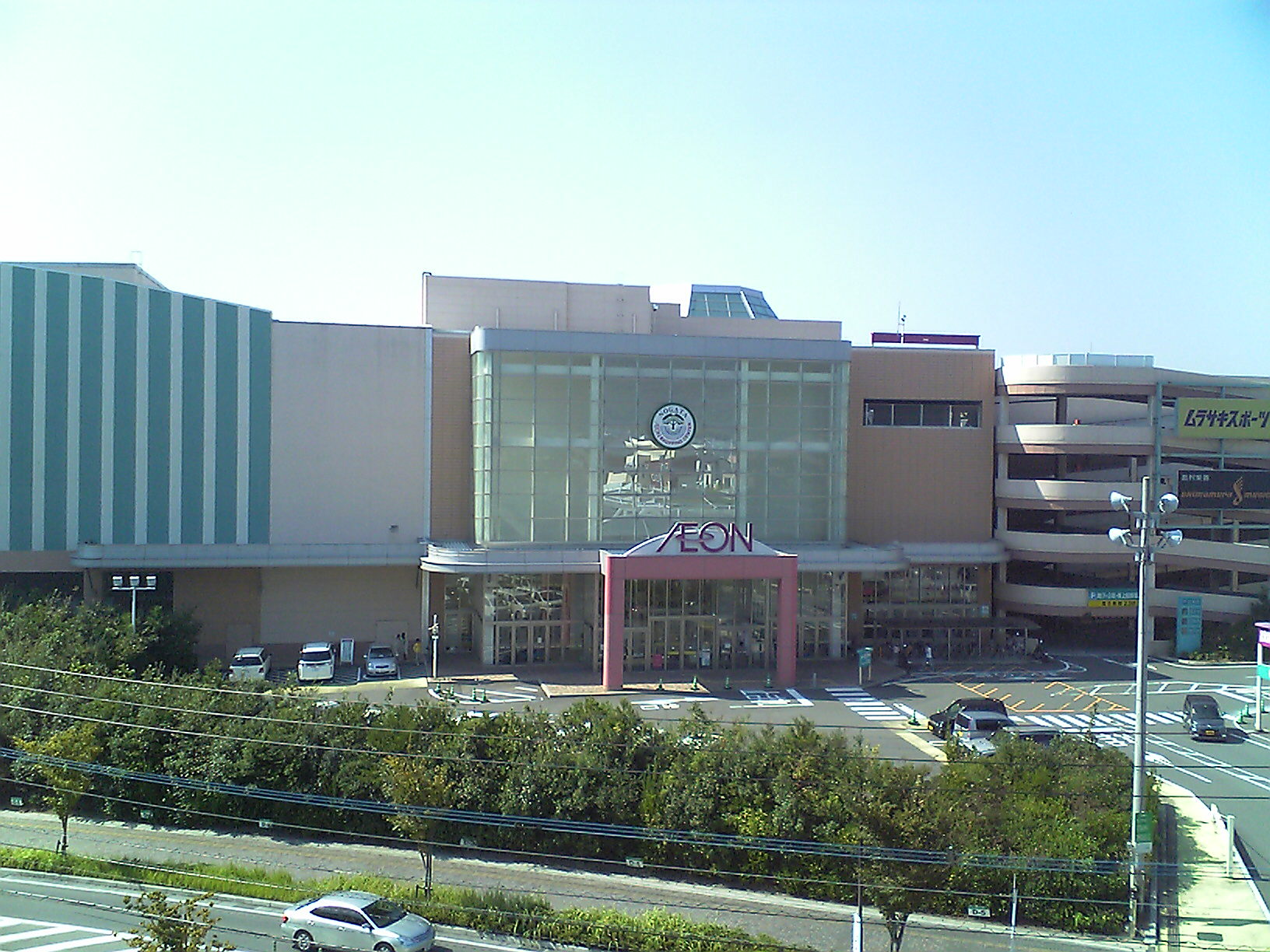 福岡県直方市のイオンモール直方